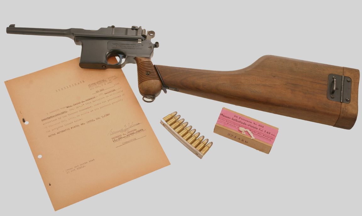 Imagen del arma Astra 900.